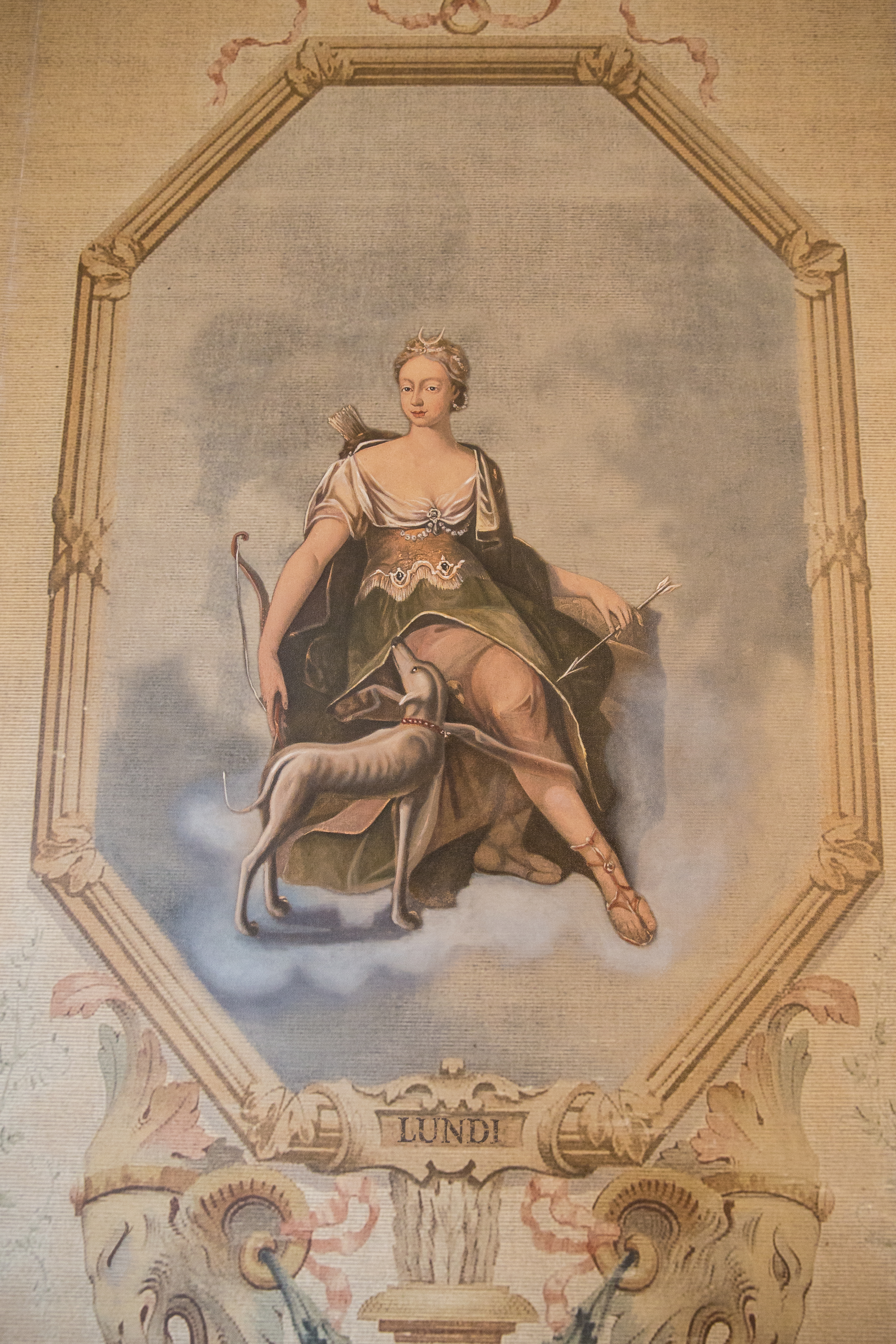 Replica van de gestolen gobelin 'Maandag' in het Ravenhofkasteel in Torhout